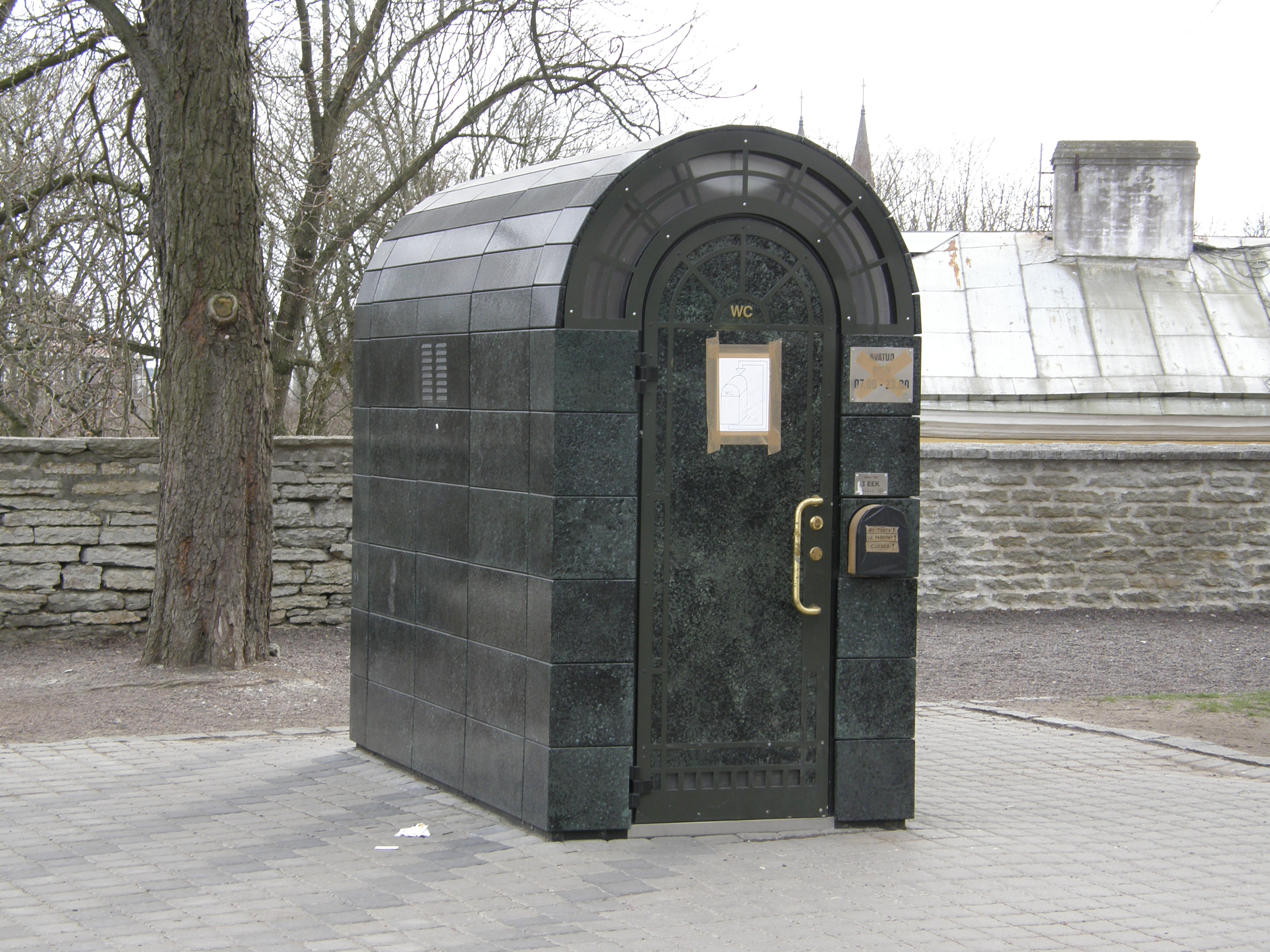 Miljonipeldik.